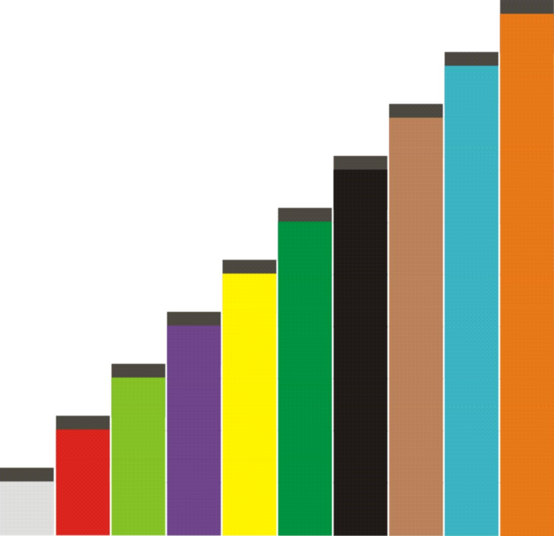 تفسير لقضبان كويزينير - شكل 1